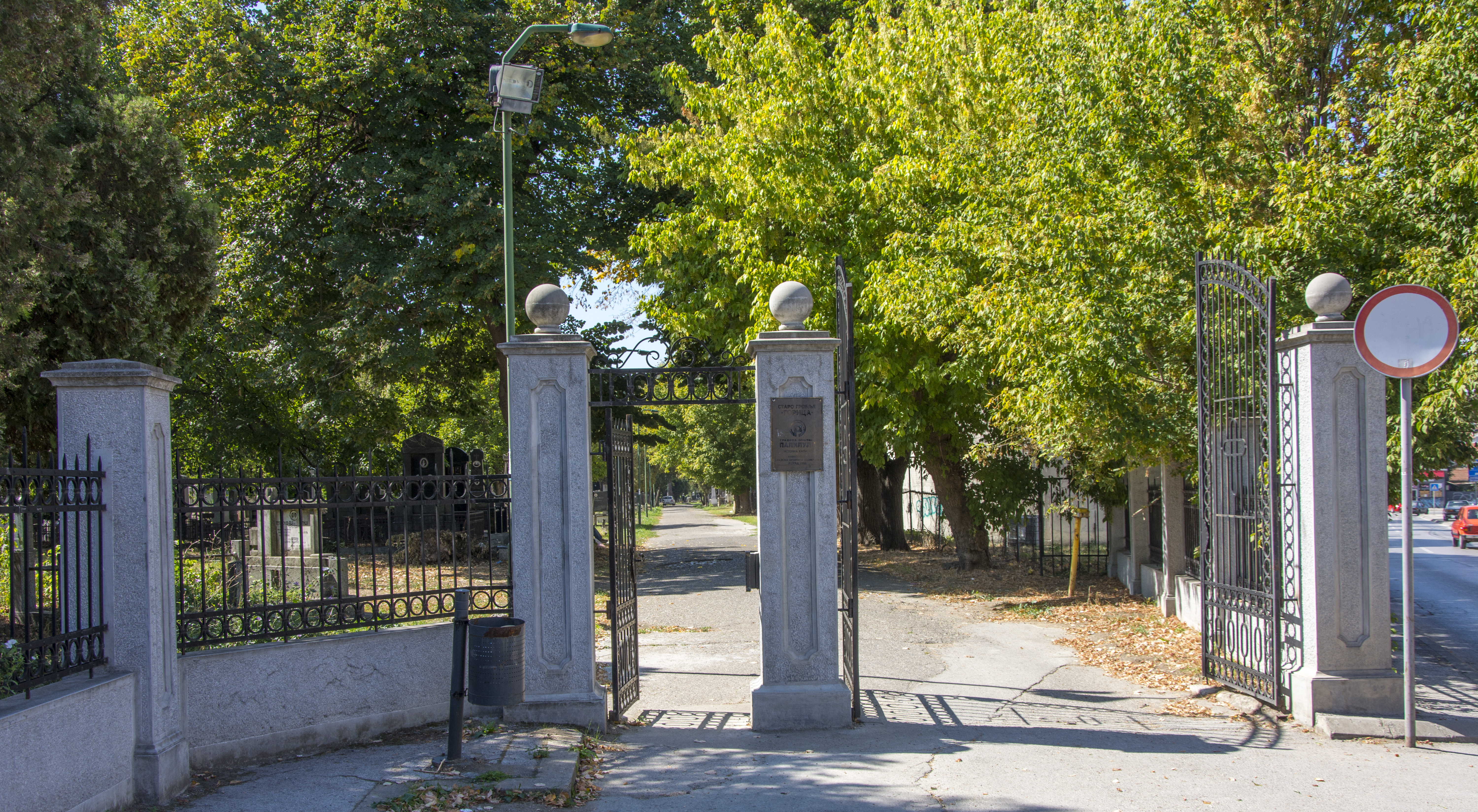 Старо Нишко гробље